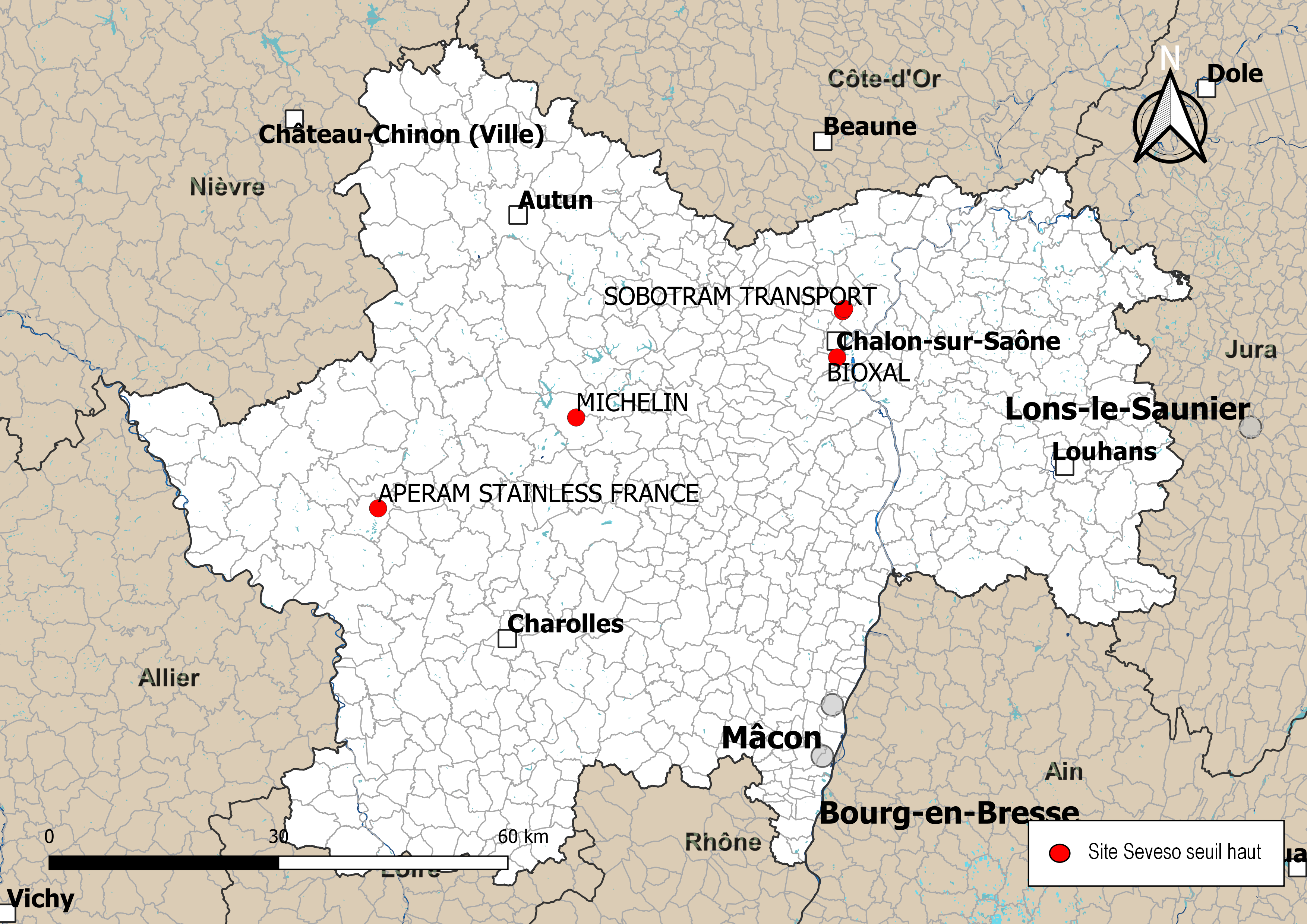 Carte de localisation des sites Seveso seuil haut dans le département de Saône-et-Loire (Bourgogne-Franche-Comté, France). Carte arrêtée au 7 novembre 2019.